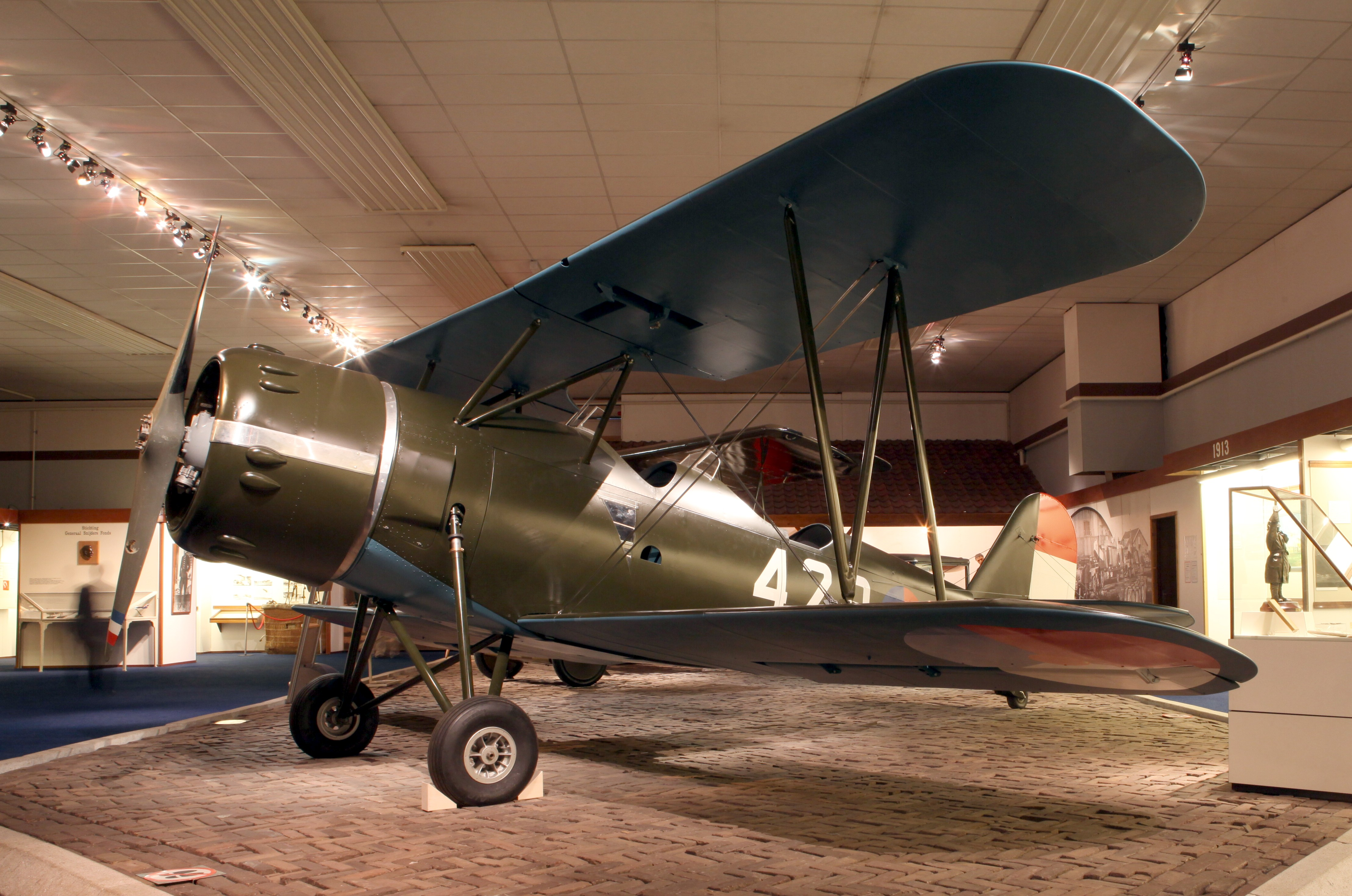 Koolhoven FK-51 seen at militare luchtvaart museum Soesterberg